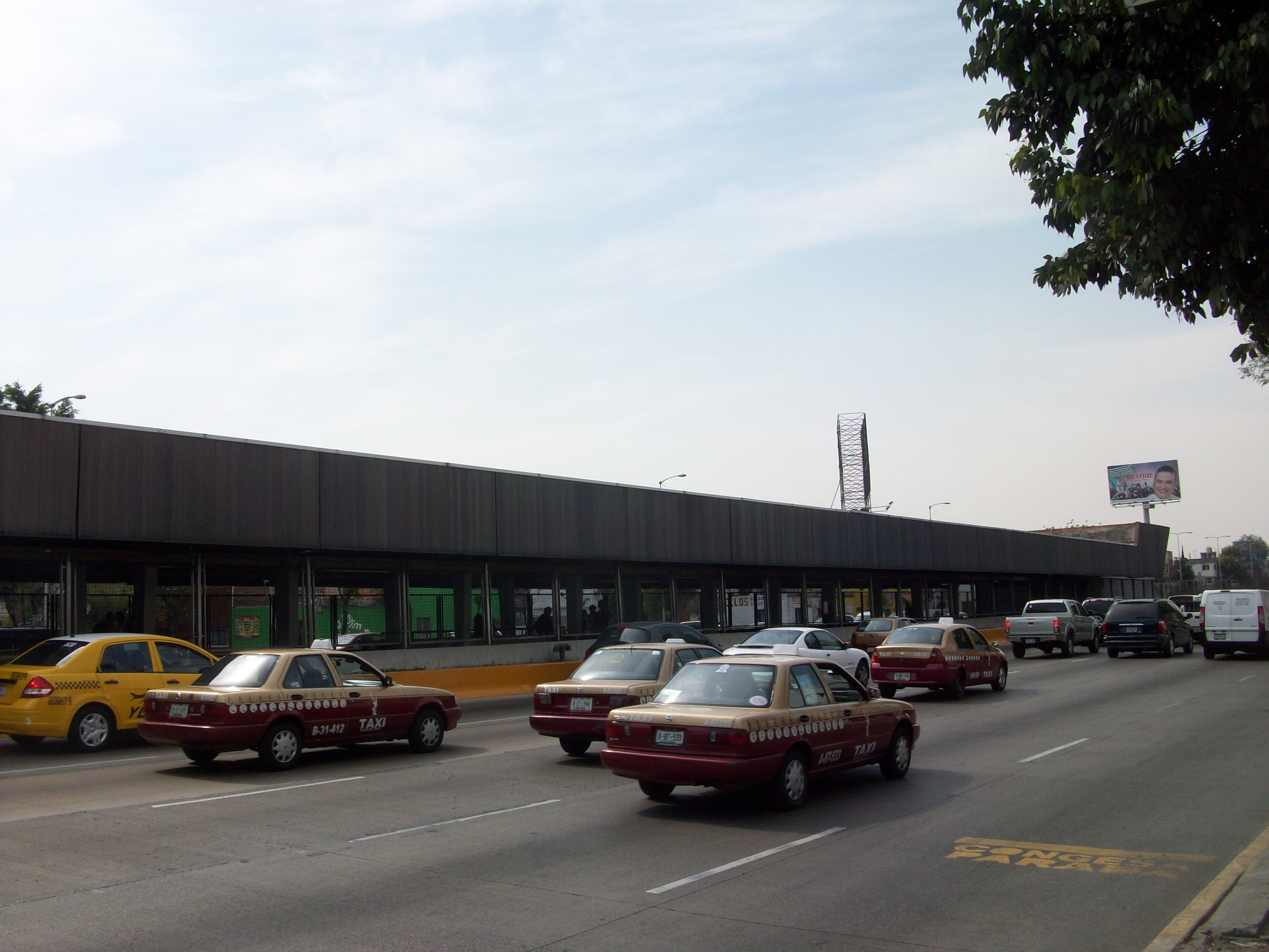 Edificio estacion Eduardo Molina